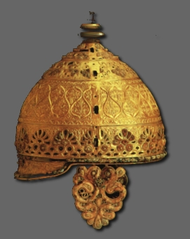 Casque celte d'apparat en fer, bronze, or, argent et corail. IVe a.J.C. Découvert à Agris, en Charente et conservé au musée d'Angoulême (IIe âge du fer).